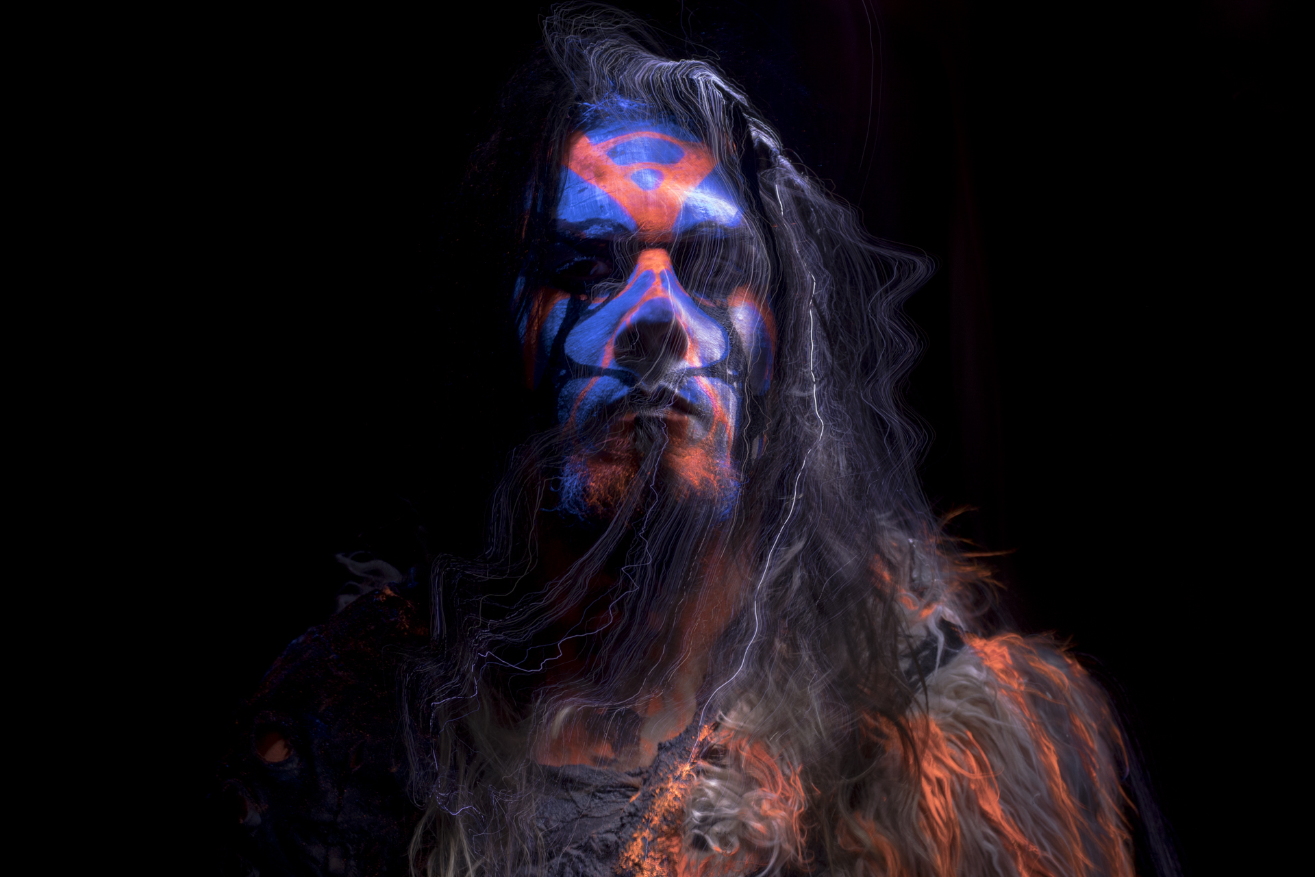 Öxxö Xööx (Laurent Lunoir)